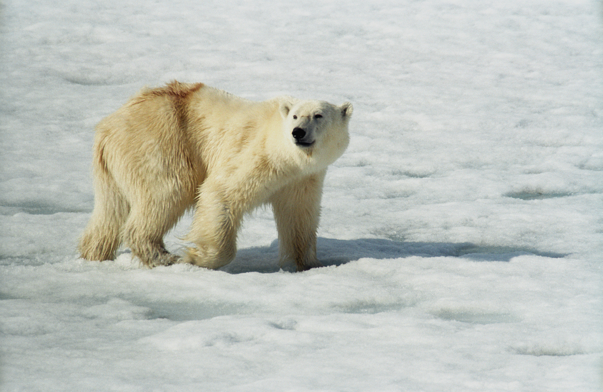 Polar Bear, Spitsbergen, Hornsund